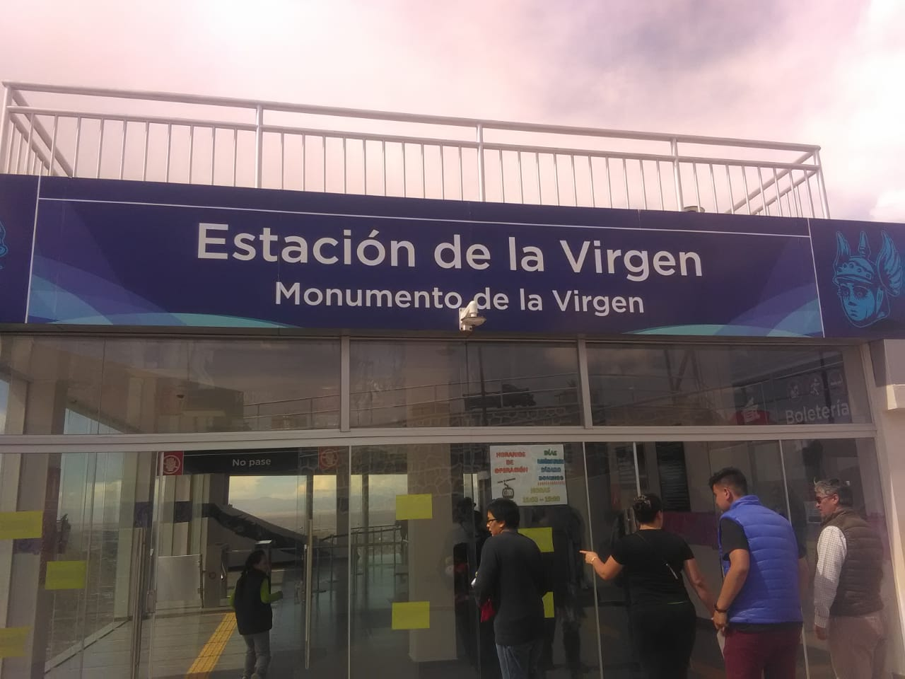 EstacionVirgen